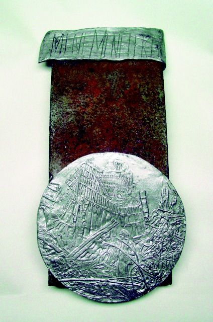 Kunstwerk mit dem Titel MENE MENE TEKEL